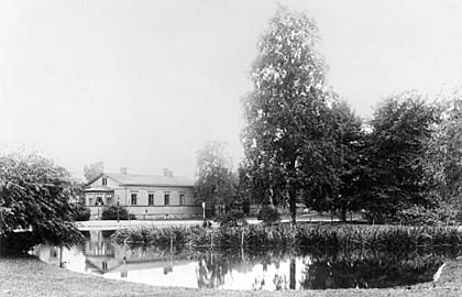 Villensauna kylpylähotelli, Kaisaniemi, Helsinki